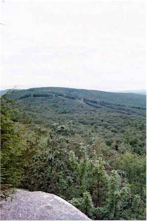 Rose_Ledge, Erving Massachusetts